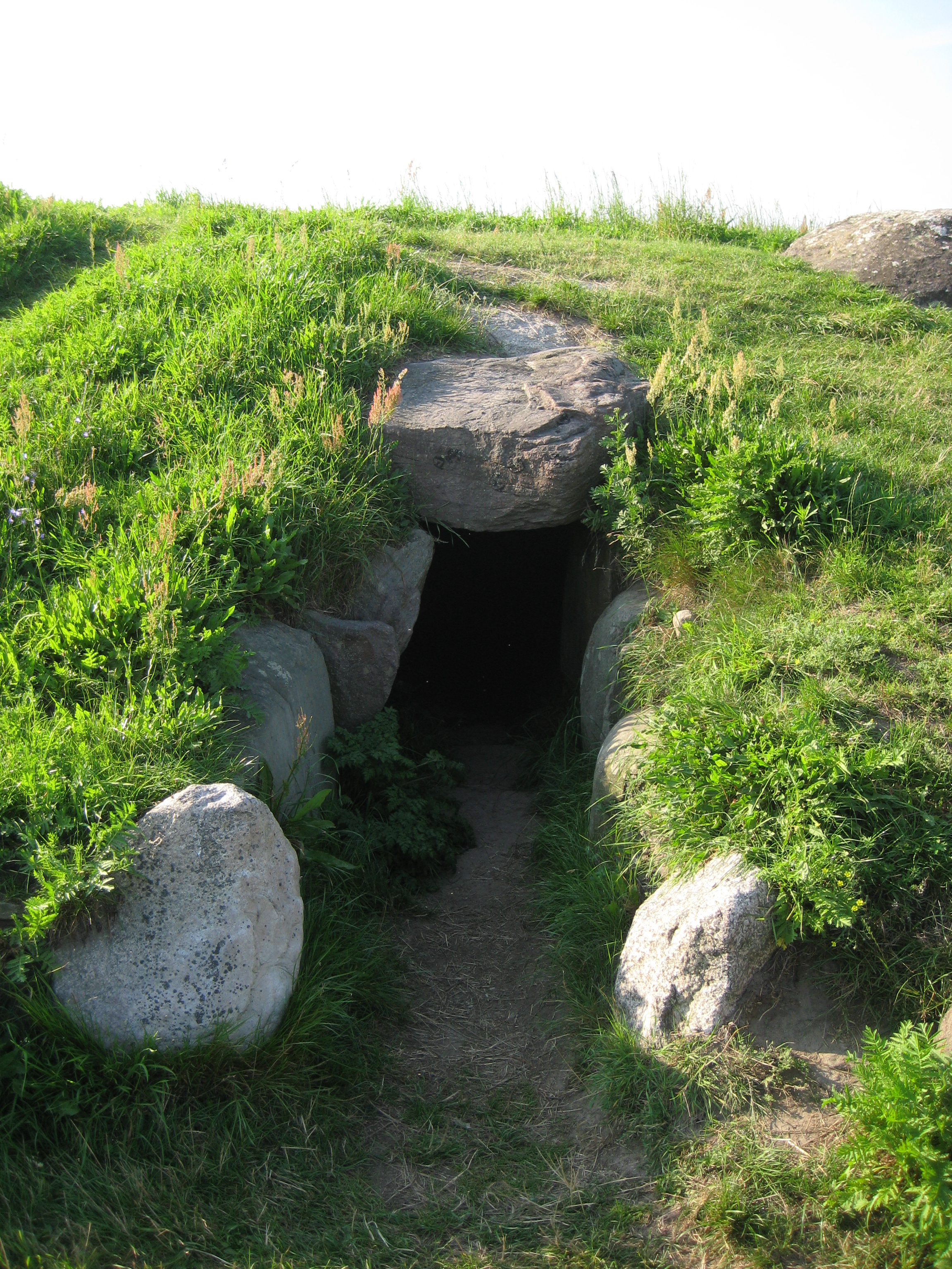 Ganggrab von Kragnæs